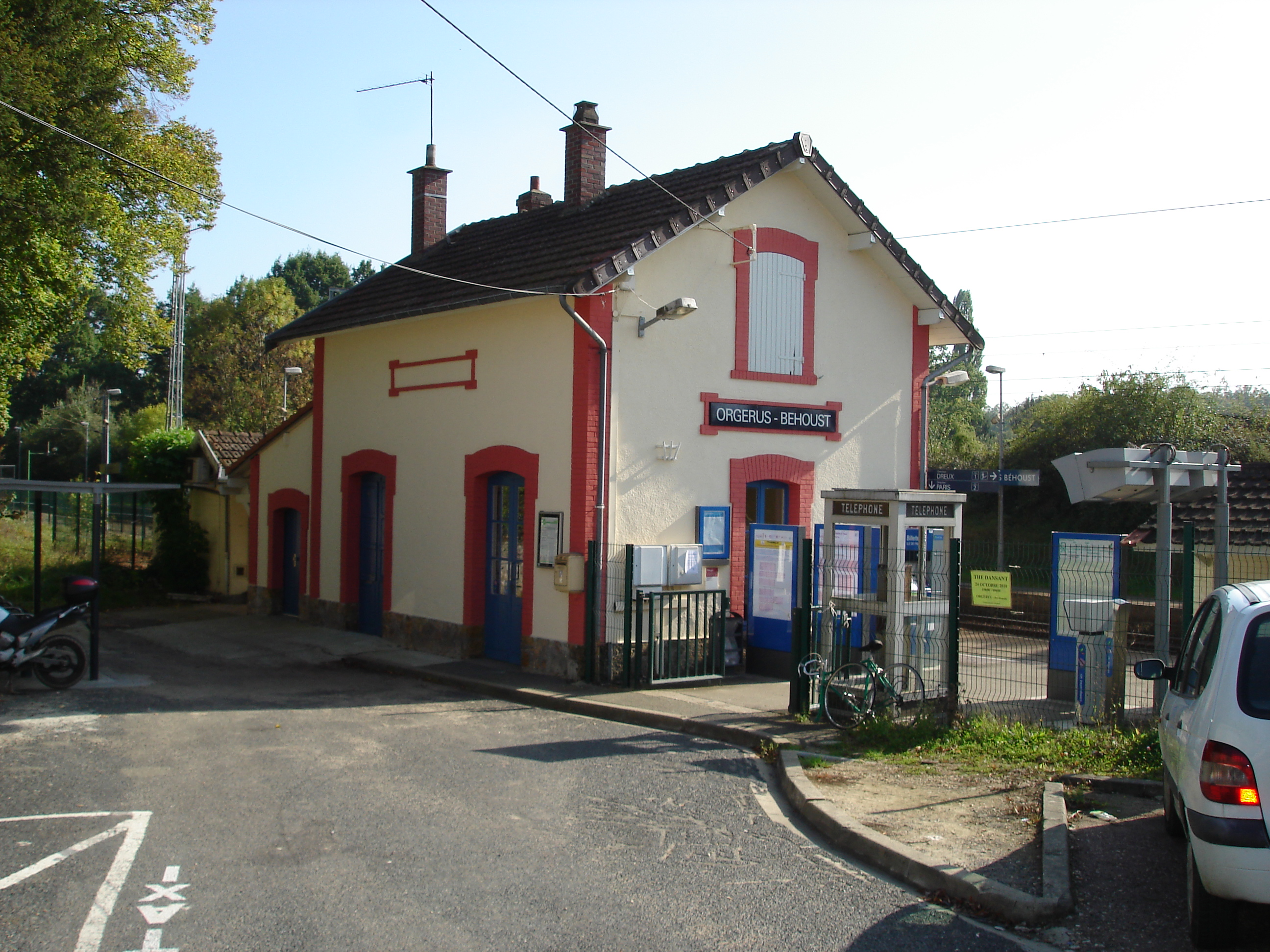 Gare d'Orgerus - Béhoust (78) : Le bâtiment voyageurs.